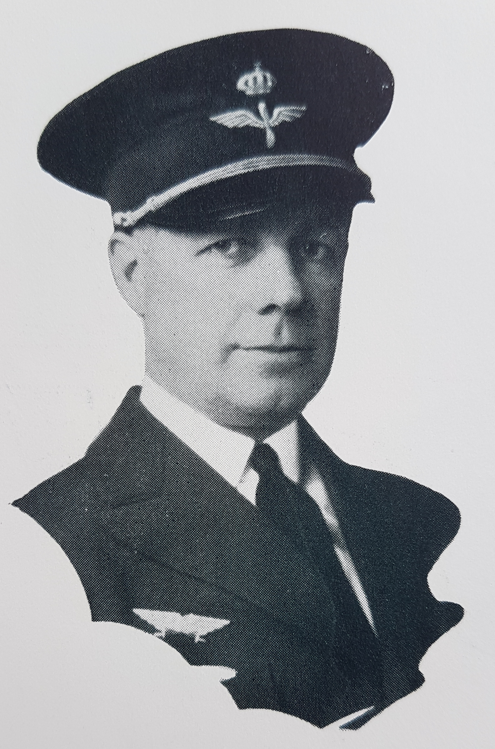 Fredrik Adilz